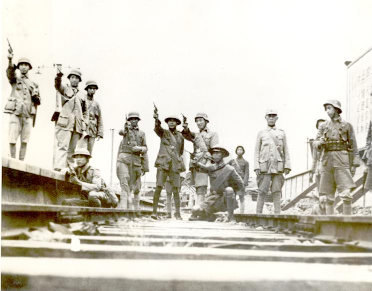 モーゼルC96を構えた中国軍兵士ら